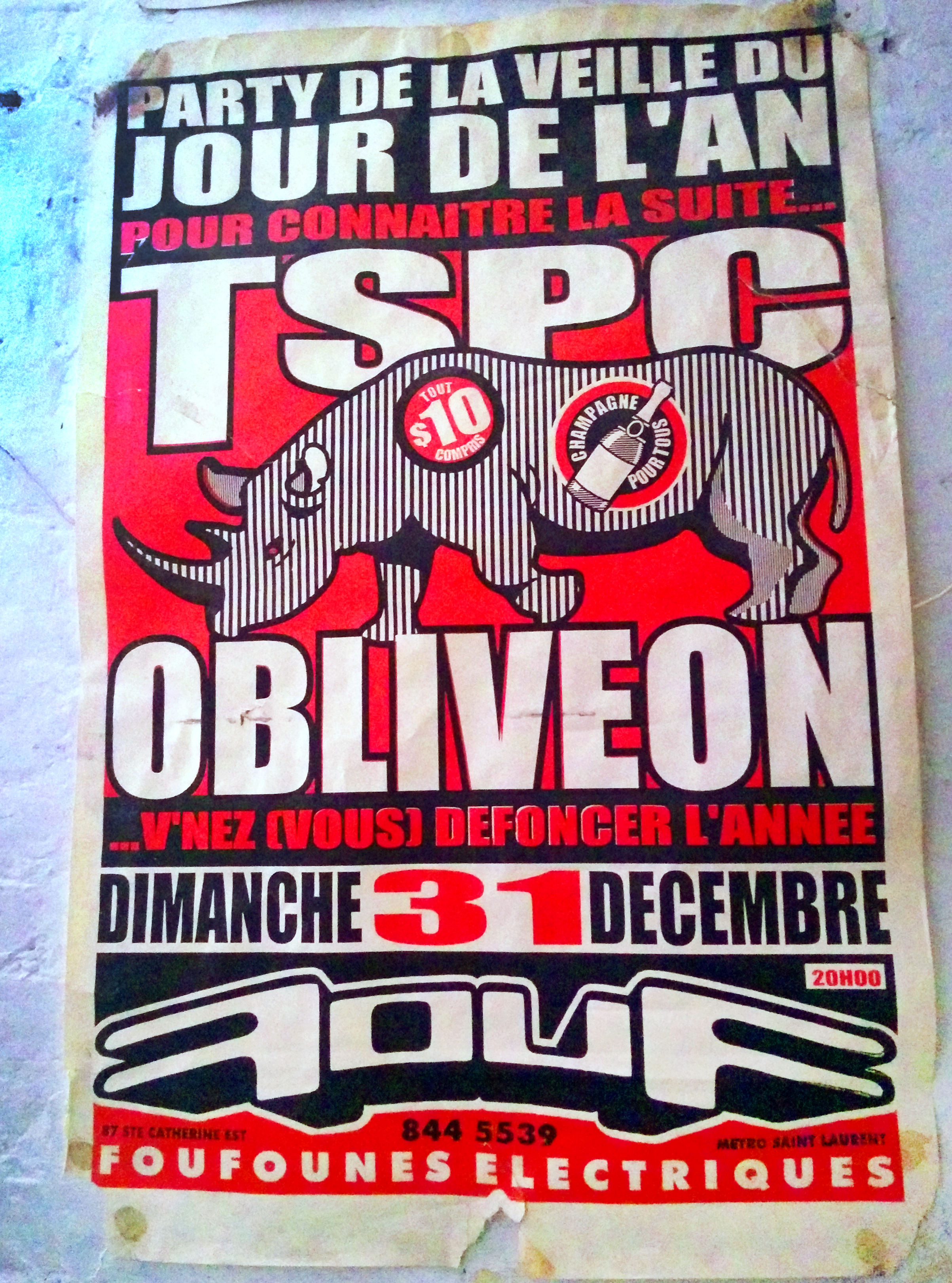 Montreal, 12-12-2014.